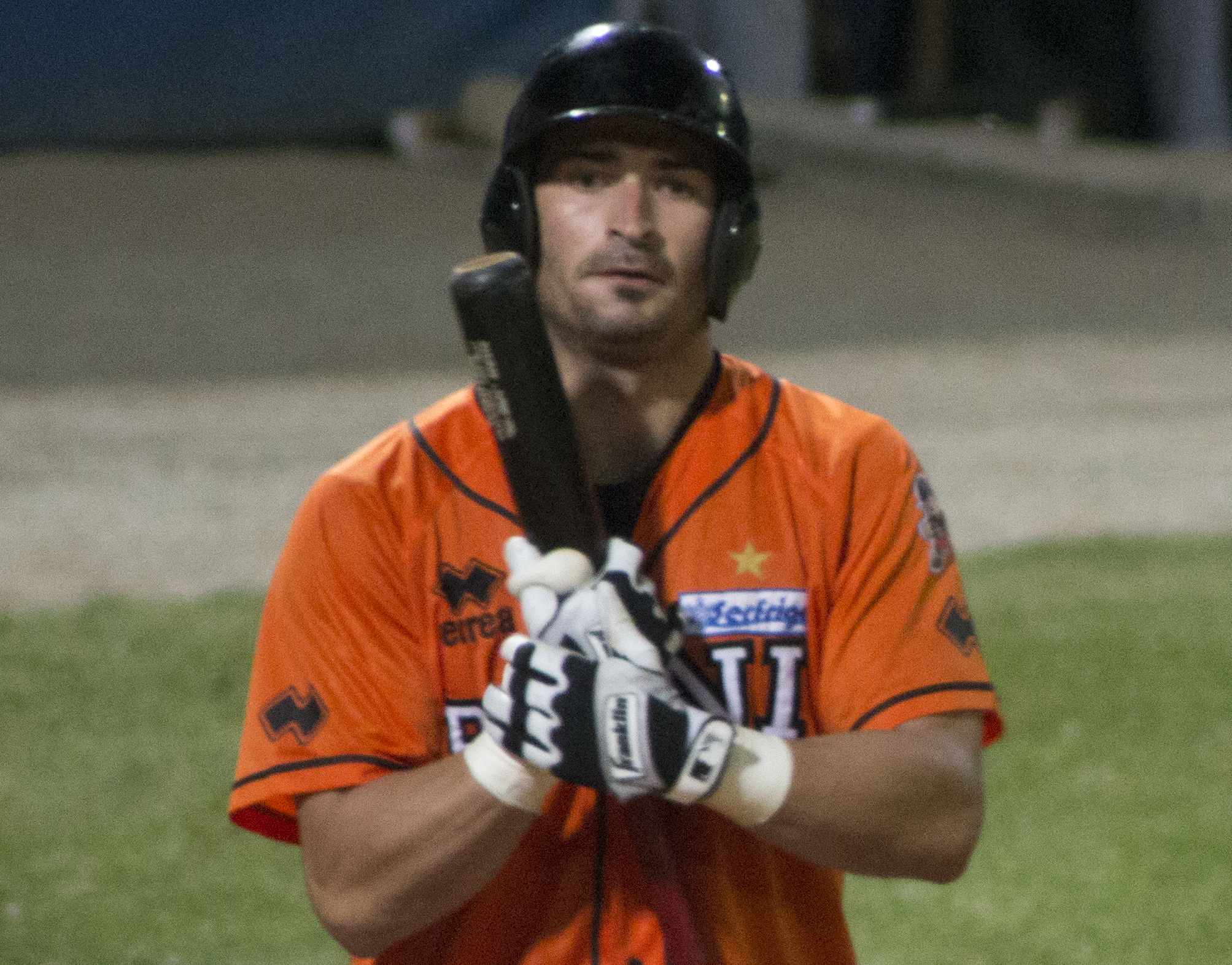 Leo Zileri nella semifinale IBL 2013 (gara3) disputata tra il Rimini Baseball e il Nettuno.